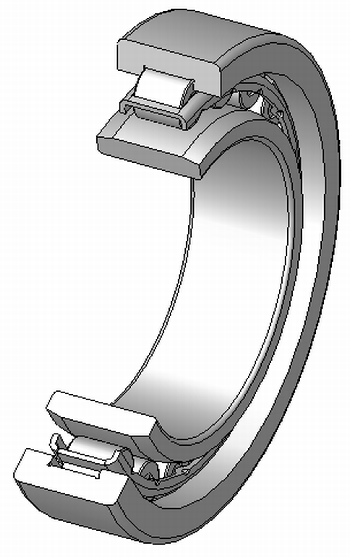 Zylinderrollenlager, Innenring ohne Borde, Aussenring mit zwei Borden, Blechkäfig aus Stahl, zerlegbar, 120°Schnitt, Hinweis: Innenaufbau des Lagers (insbesondere des Kaefigs) variiert je nach Hersteller und Baugroesse rolling contact bearings